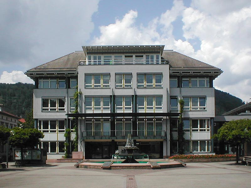 Rathaus von Eberbach/Neckar